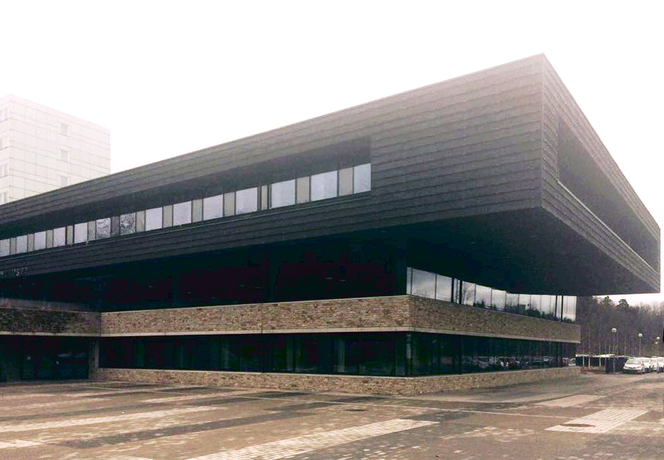 Fastigheten sedd från Frescativägen, i bakgrunden syns en av Södra husens höghus.